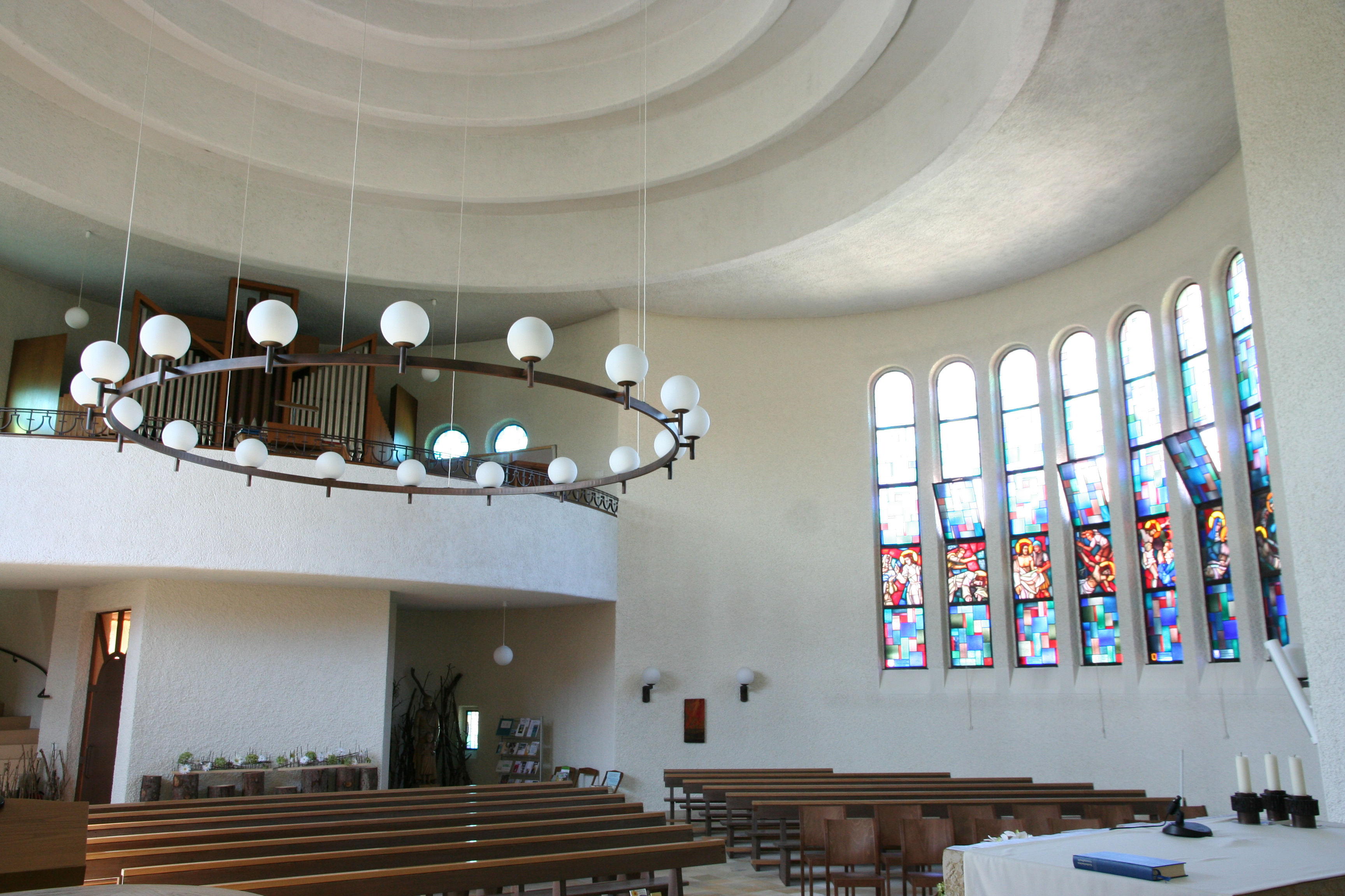 röm.-kath. Pfarrkirche St. Joseph Bussnang TG